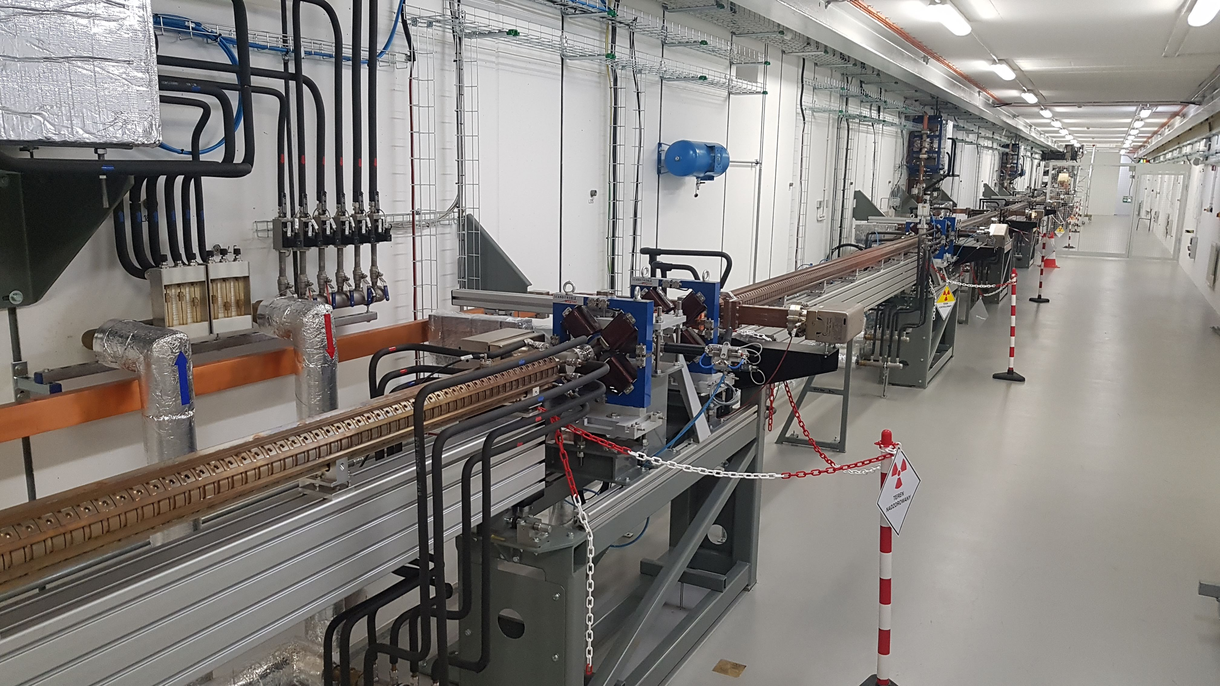 Widok na akcelerator liniowy, który znajduje się 8 metrów pod ziemią w budynku synchrotronu SOLARIS. Zdjęcie wykonane podczas wyłączenia synchrotronu w kwietniu 2019 roku